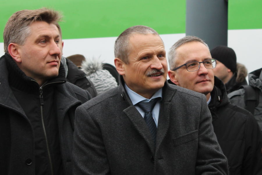 Prezes Zarządu przedsiębiorstwa Pesa Bydgoszcz Tomasz Zaboklicki podczas uroczystego przekazania Kolejom Mazowieckim pociągów push-pull wyprodukowanych przez Pesę Bydgoszcz.